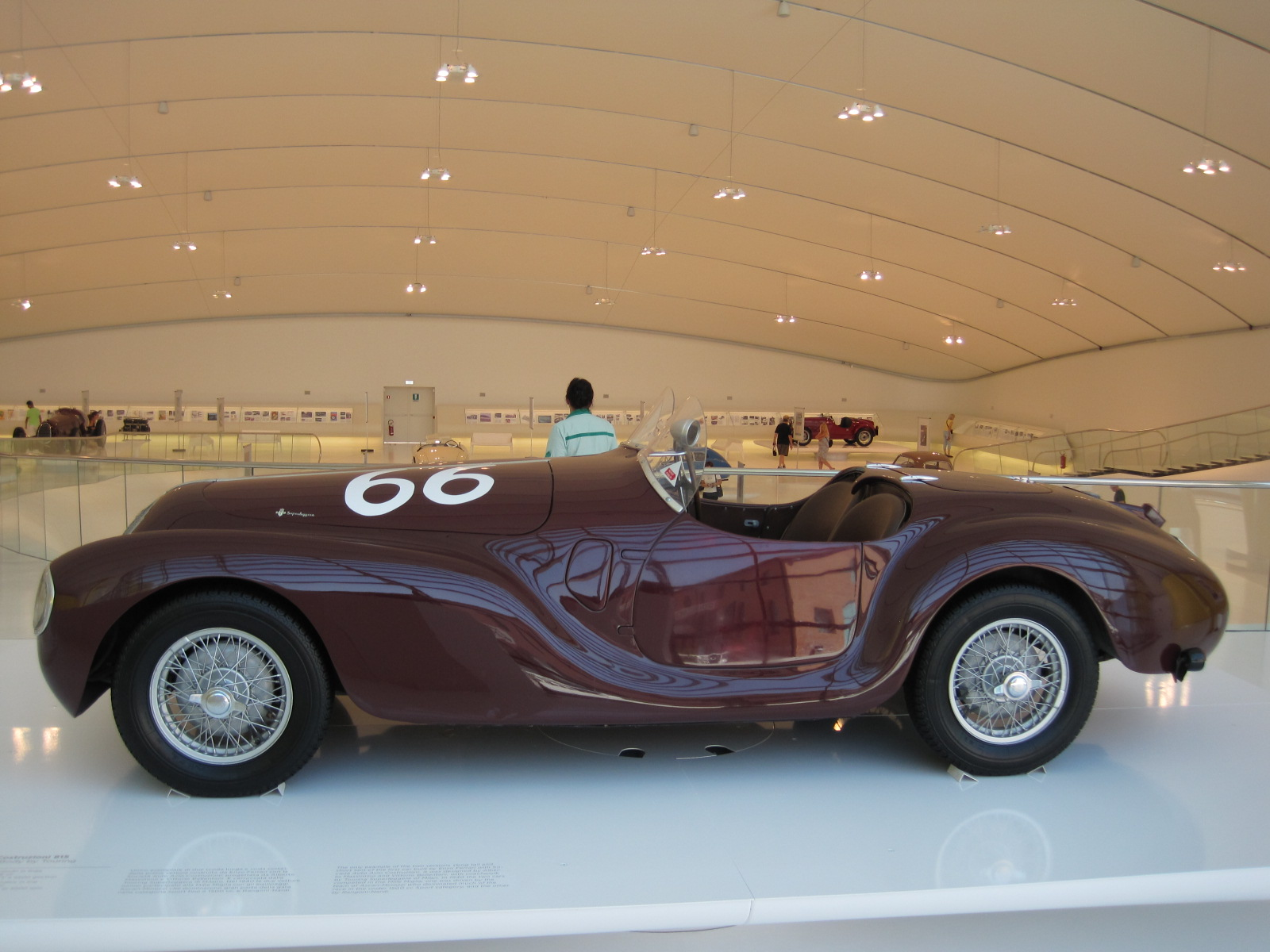 Automobiles in Enzo Ferrari Museum in Modène - Auto Avio Costruzioni 815 - 1940